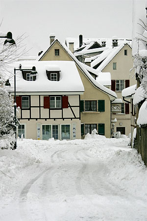 Arlesheim: Ermitagestrasse